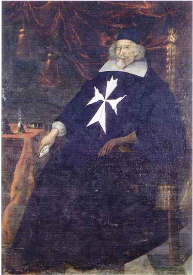 Ritratto di ignoto del Gran Maestro Giovanni Paolo Lascari, conservato in collezione privata, sec. XVII